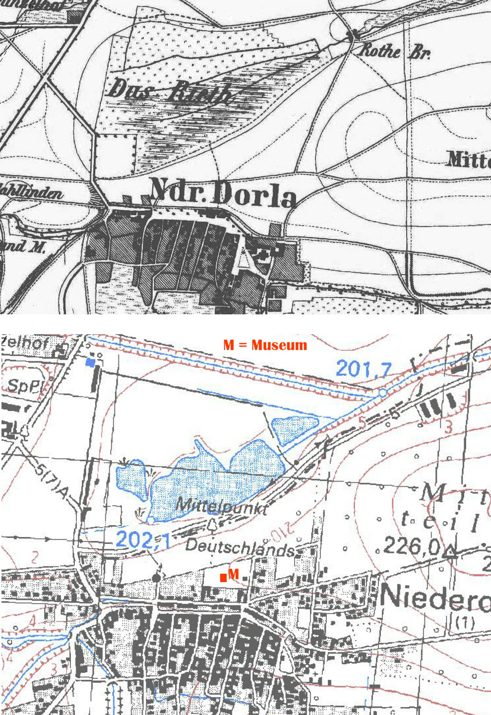 Übersichtskarte zum Opfermoor bei Niederdorla.